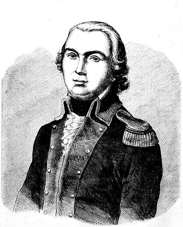 Józef Niemojewski 1769-1839